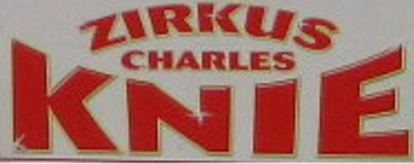 Signet des Zirkus Charles Knie, Volksen (Einbeck) Deutschland